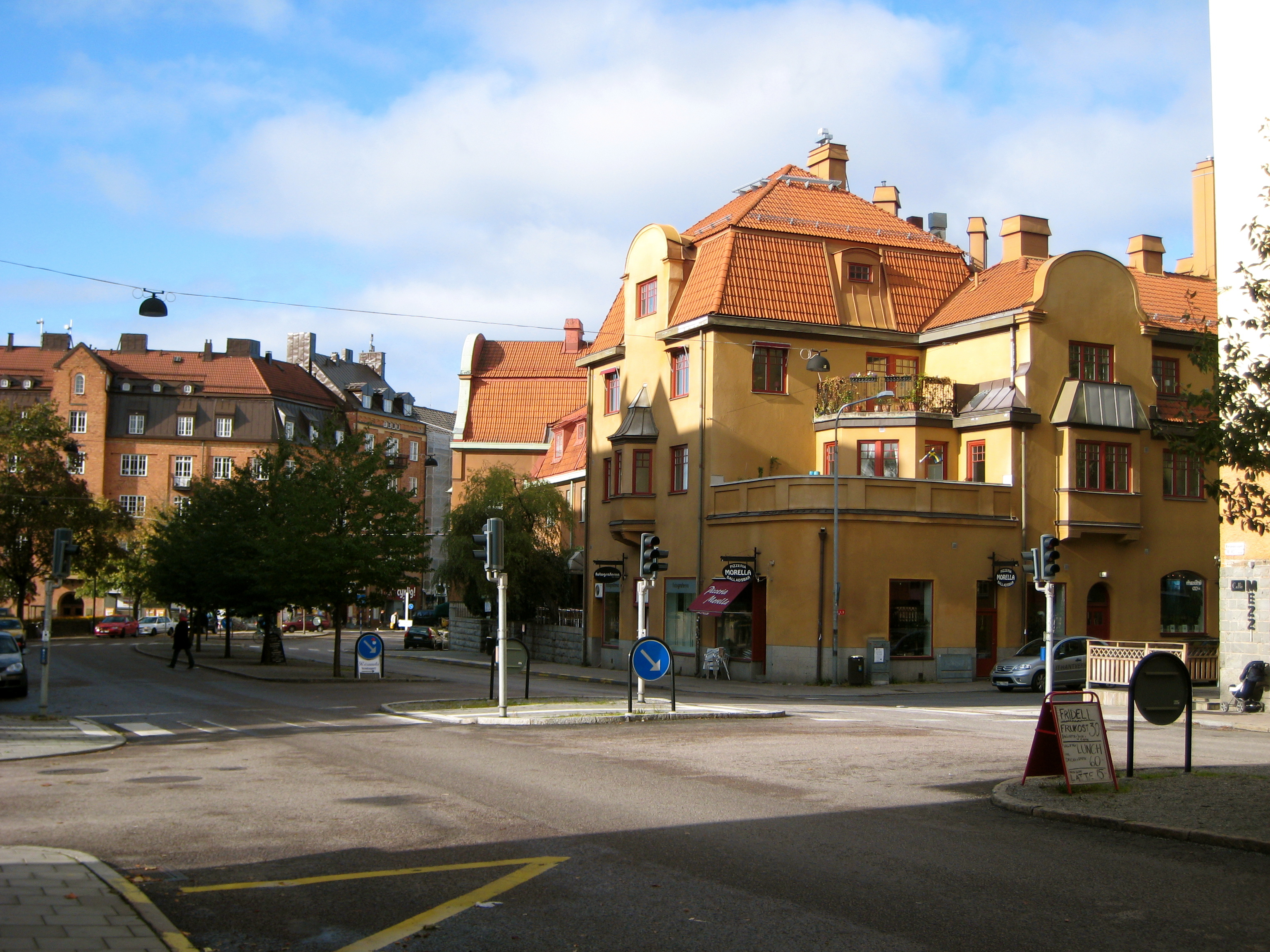 Råsundavägen. Hörnhuset 112-114 byggt 1909. Arktekter G. H. Sandberg & F. Lilljekvist